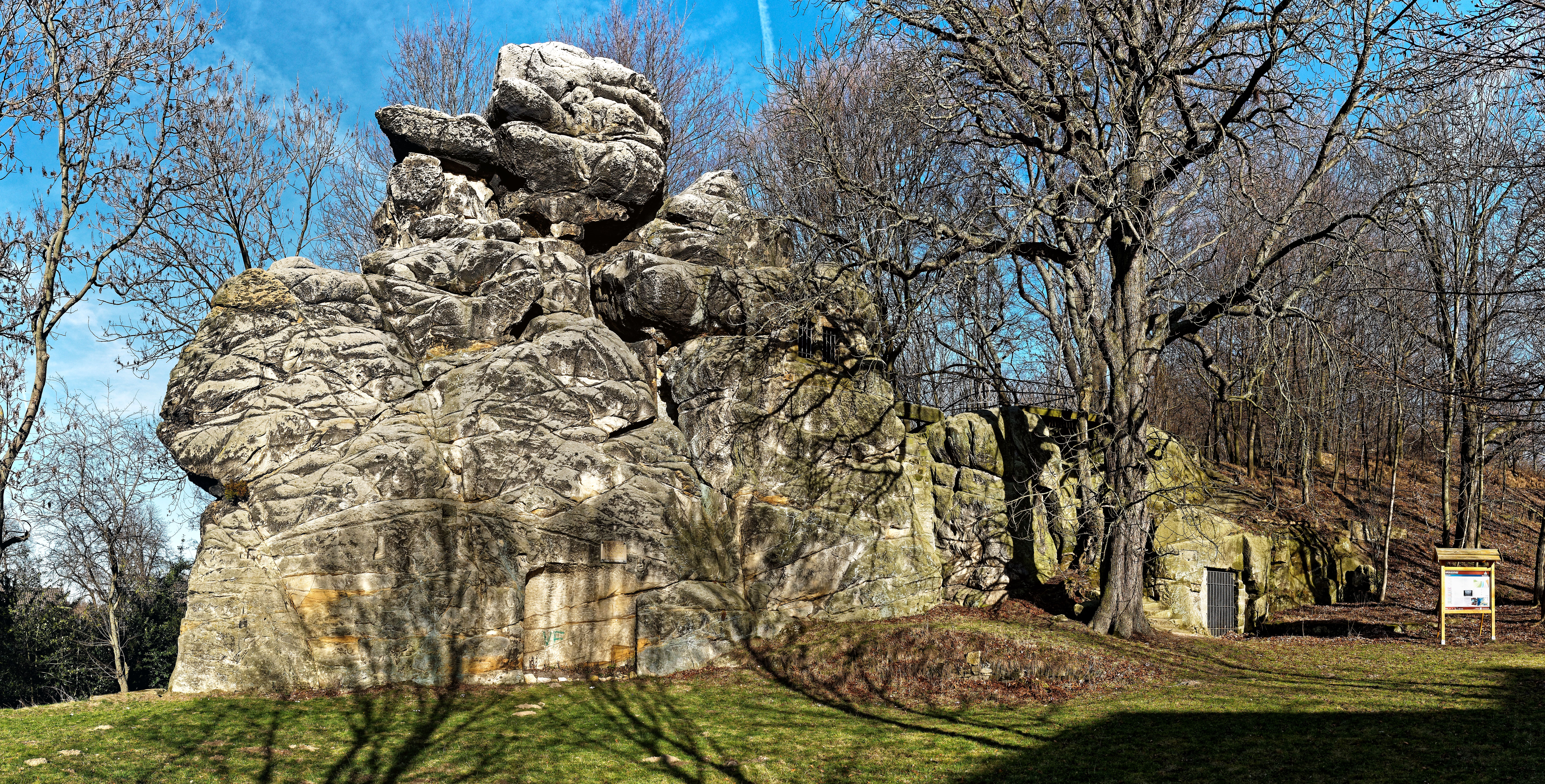 Westseite des Klusfelsens in Goslar